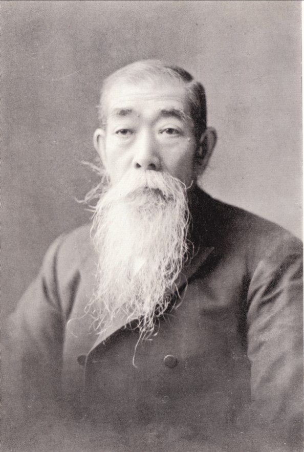 安部幸兵衛翁(Kobei ABE, 1847-1919)